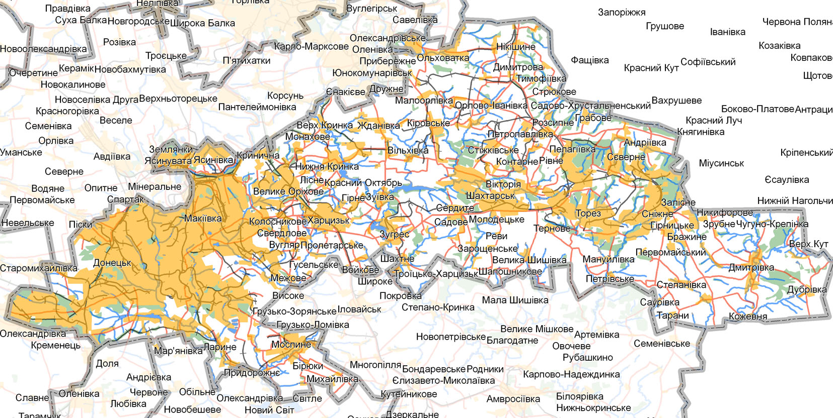 Map